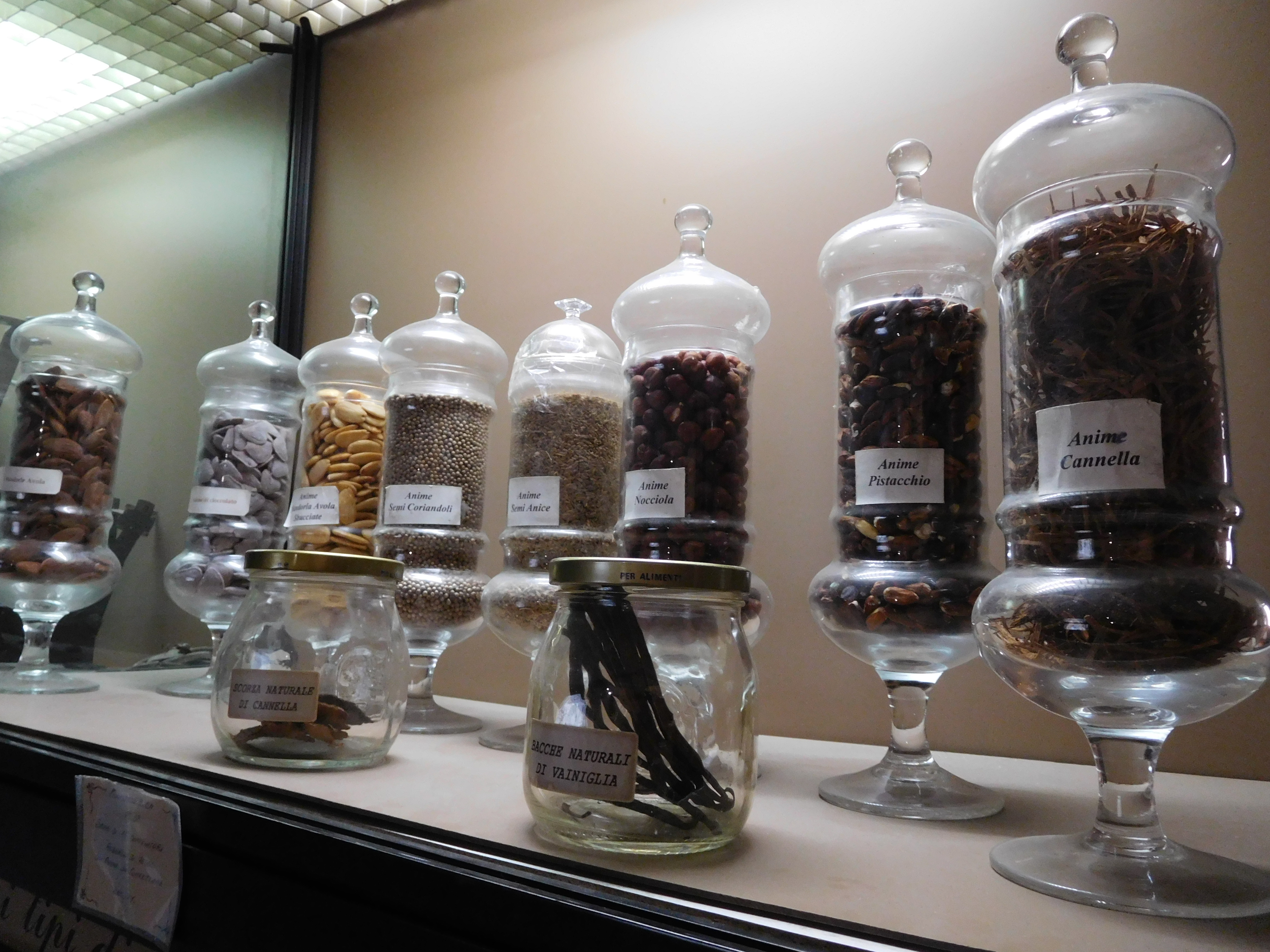 Museo dell'arte e della tecnologia confettiera, Sulmona